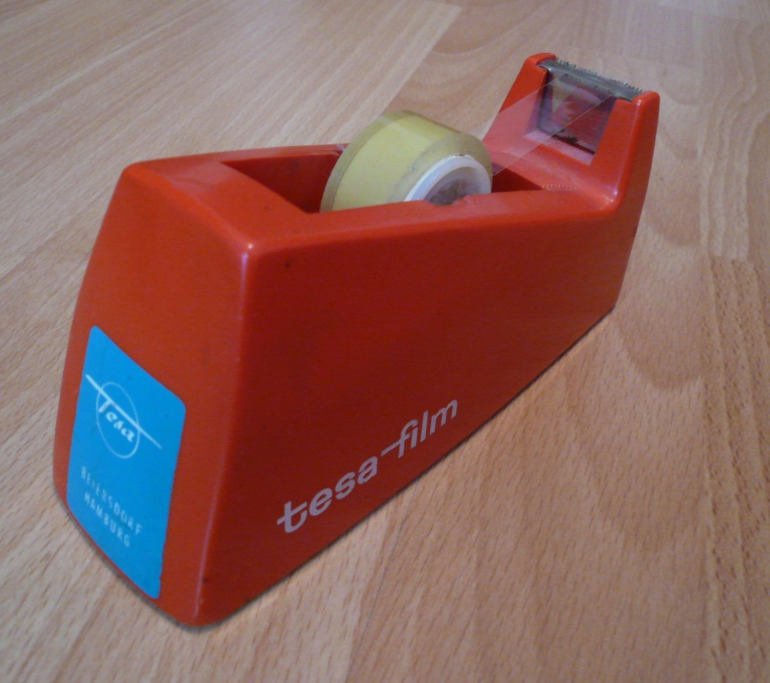 Tesafilm-Abroller